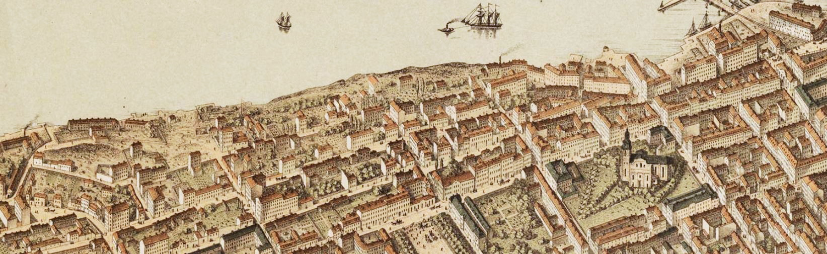 Mariaberget på Heinrich Neuhaus Stockholmspanorama